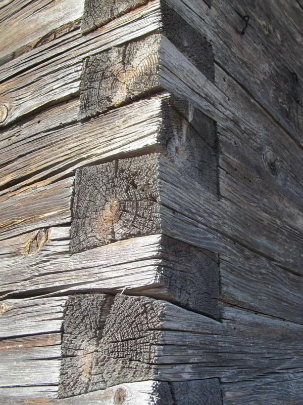 Стралкава. Сядзіба. Спосаб рубкі "у чысты вугал"